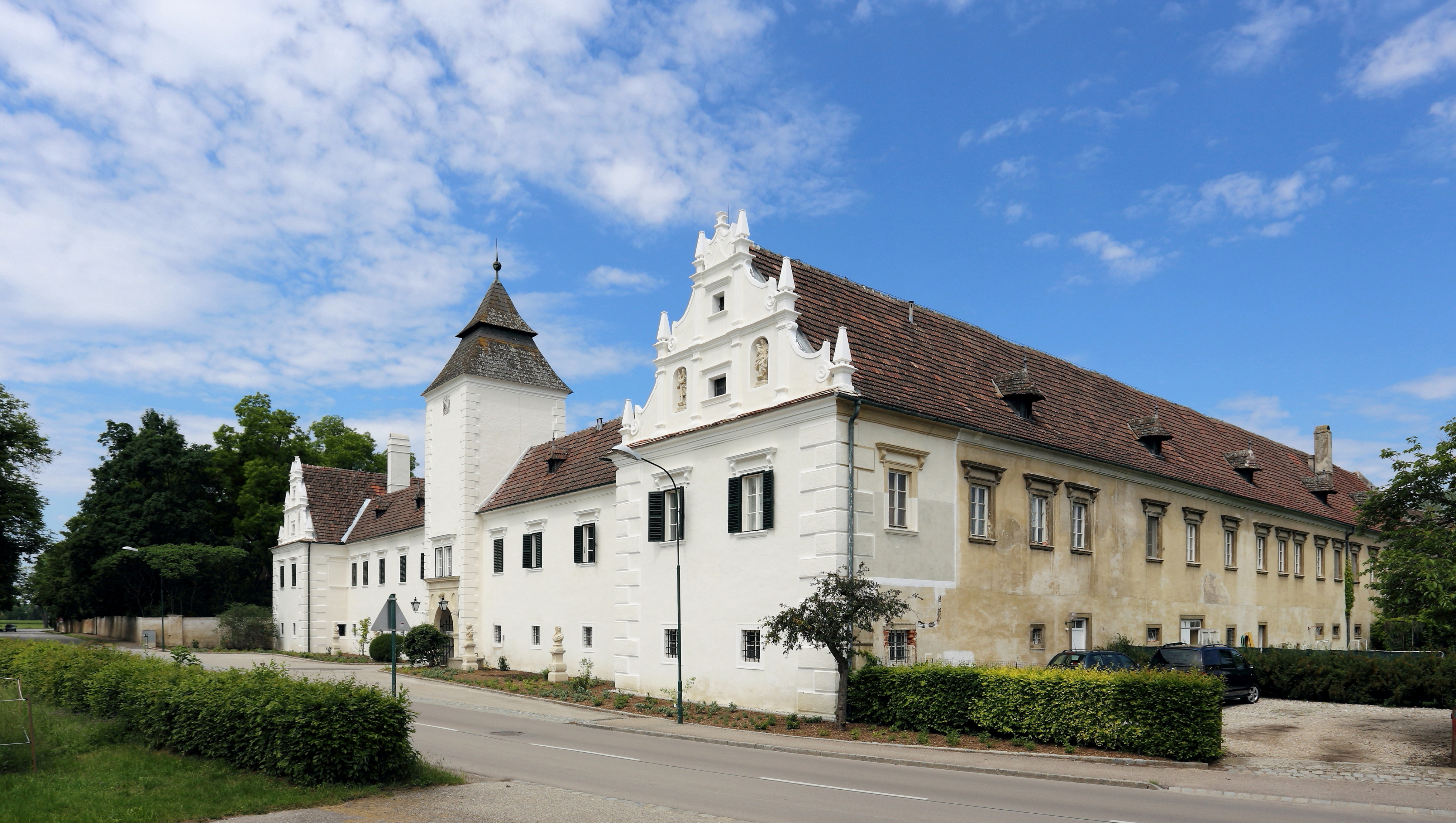 Südostansicht des Schlosses in Neuaigen, ein Ortsteil der niederösterreichischen Stadt Tulln. Eine zweigeschossige, vierflügelige Spätrenaissanceanlage aus dem 17. Jahrhundert mit leicht vorgezogenem Torturm und Seitenrisaliten an der südlichen Eingangsfassade.